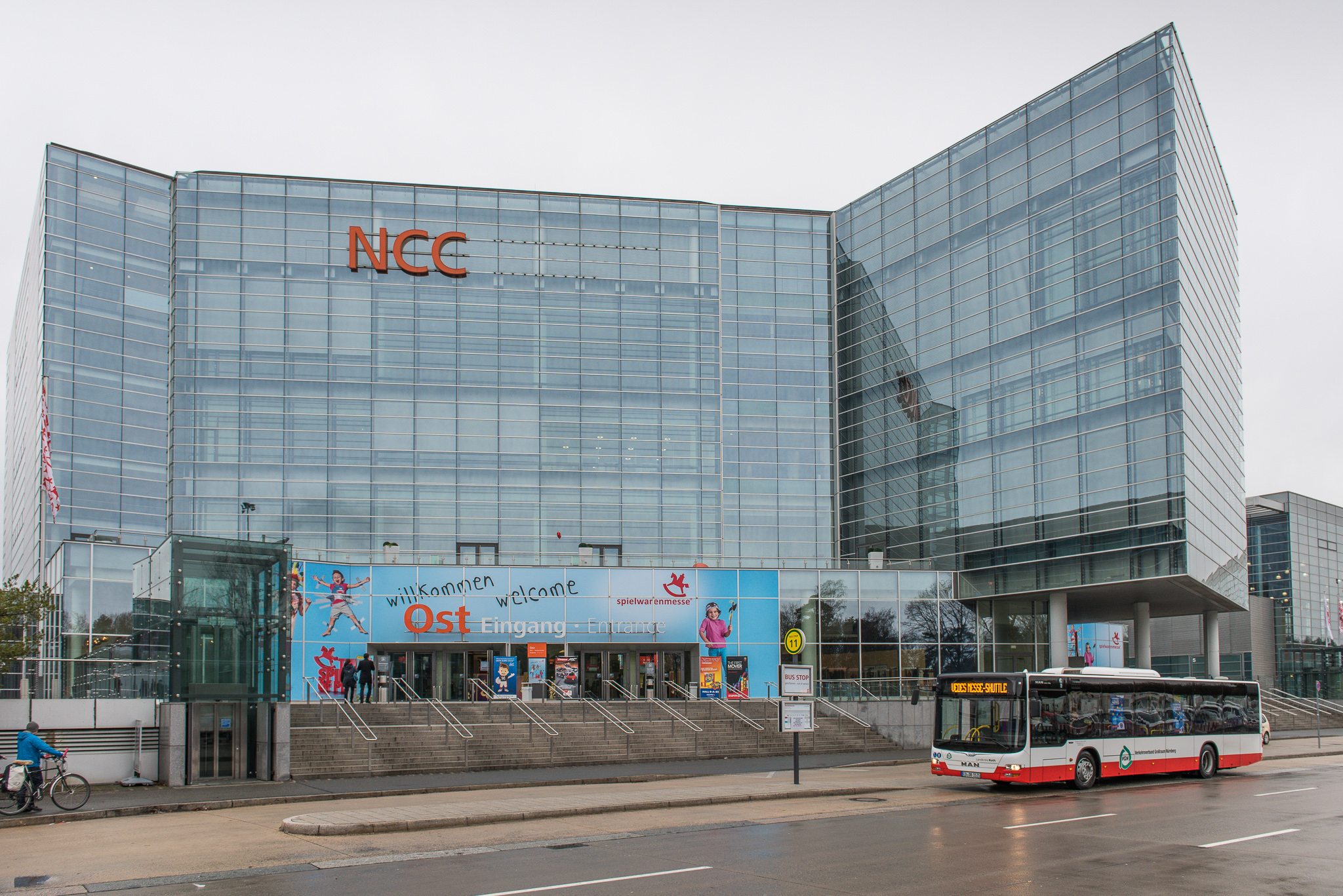 International Toy Fair Nürnberg,Messe Nürnberg,Spielwarenmesse,Zugang Ost